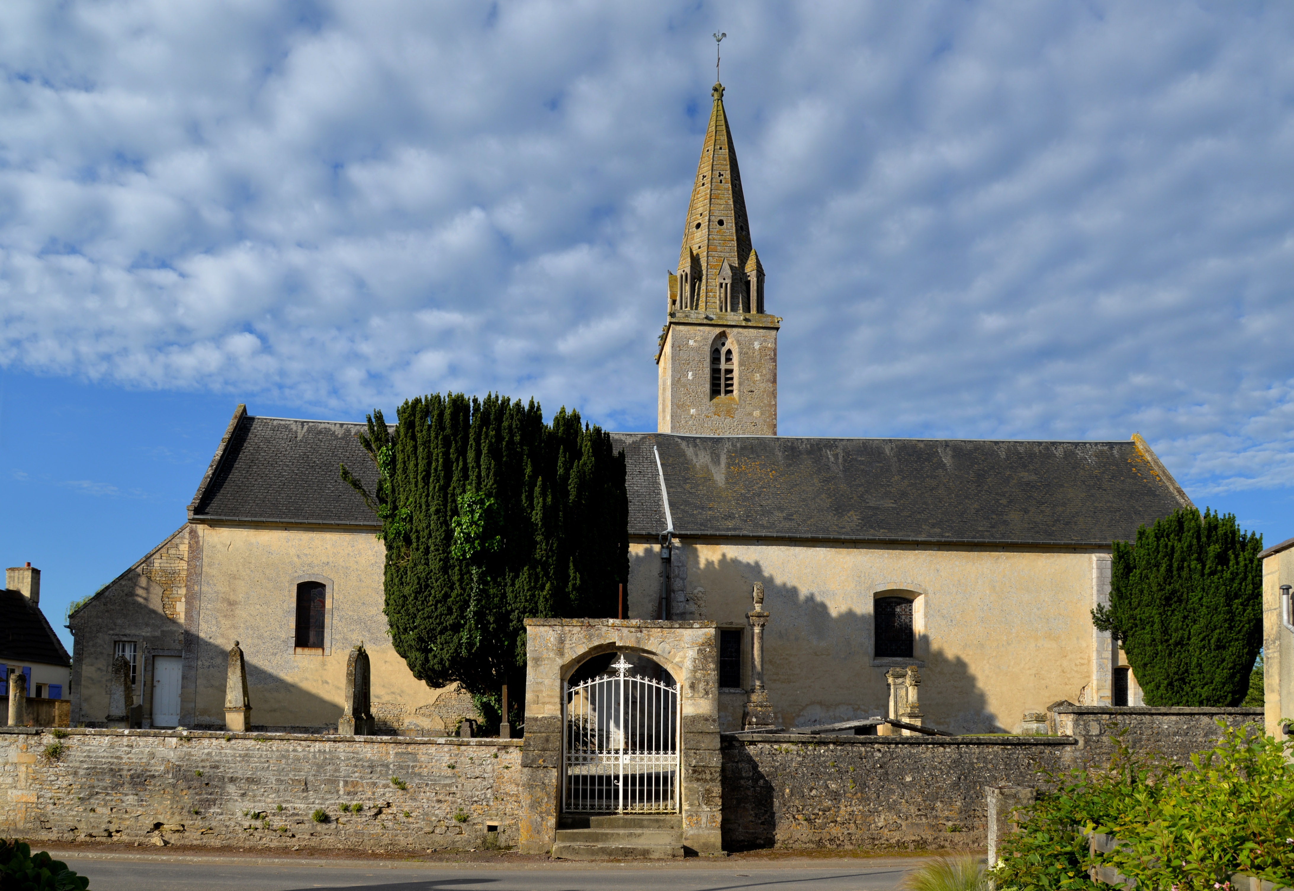 Lasson (Calvados)